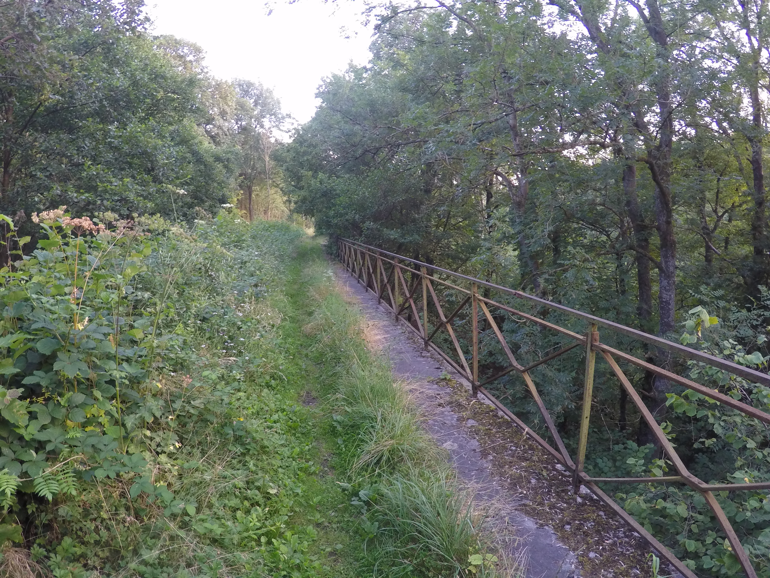 Ancien pont ferroviaire dit des "Sept Ponts" à Yves-Gomezée, il accueillait la ligne 132 de la SNCB avant que le tracé ne soit modifié